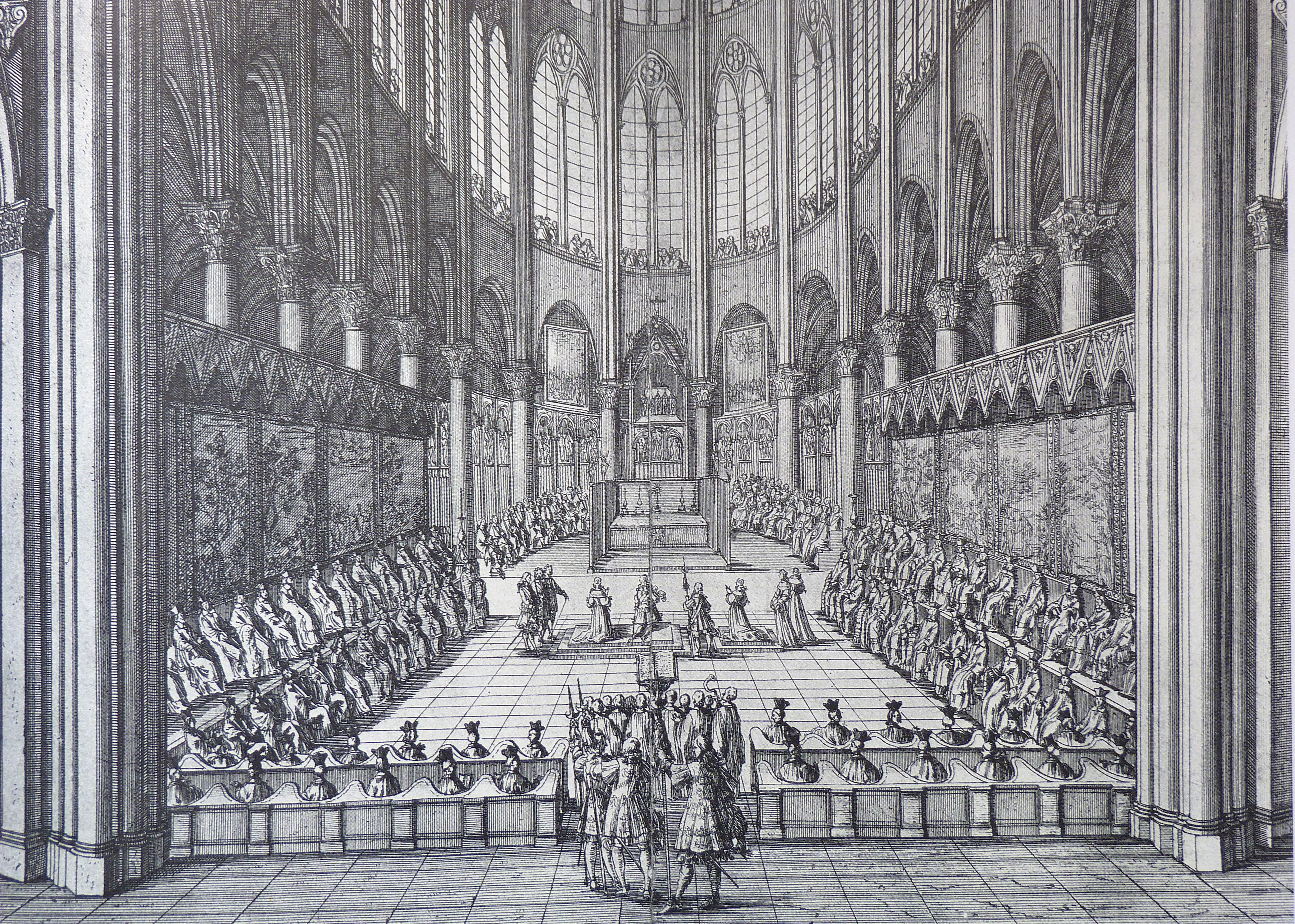 Choeur de N-D de Paris lors du Te Deum donné en 1669, gravure de Jean Marot (1619-1679), musée Notre-Dame.